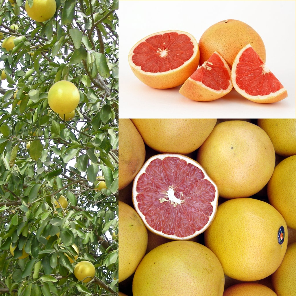 Grafika podręcznika Wikijunior:Owoce. Grejpfrut (Citrus x paradisi).